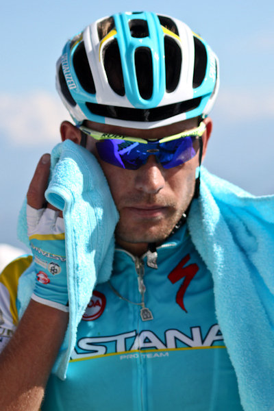 4e étape (Col du Grand Colombier) du Tour de l'Ain 2011